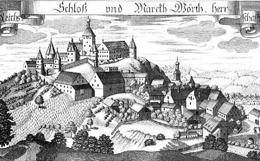 Stich von Michael Wening um 1700 Markt Wörth Donau Scan